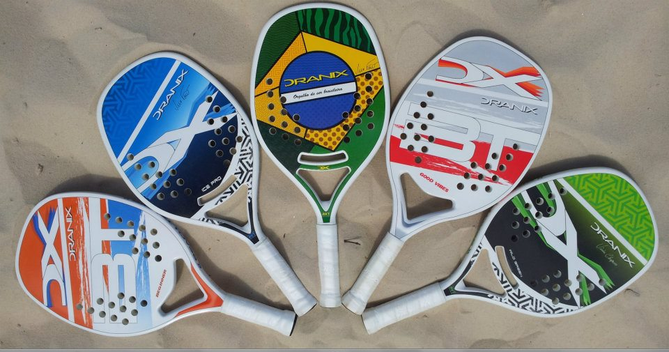 Raquetes utilizadas atualmente na prática do Beach Tennis.